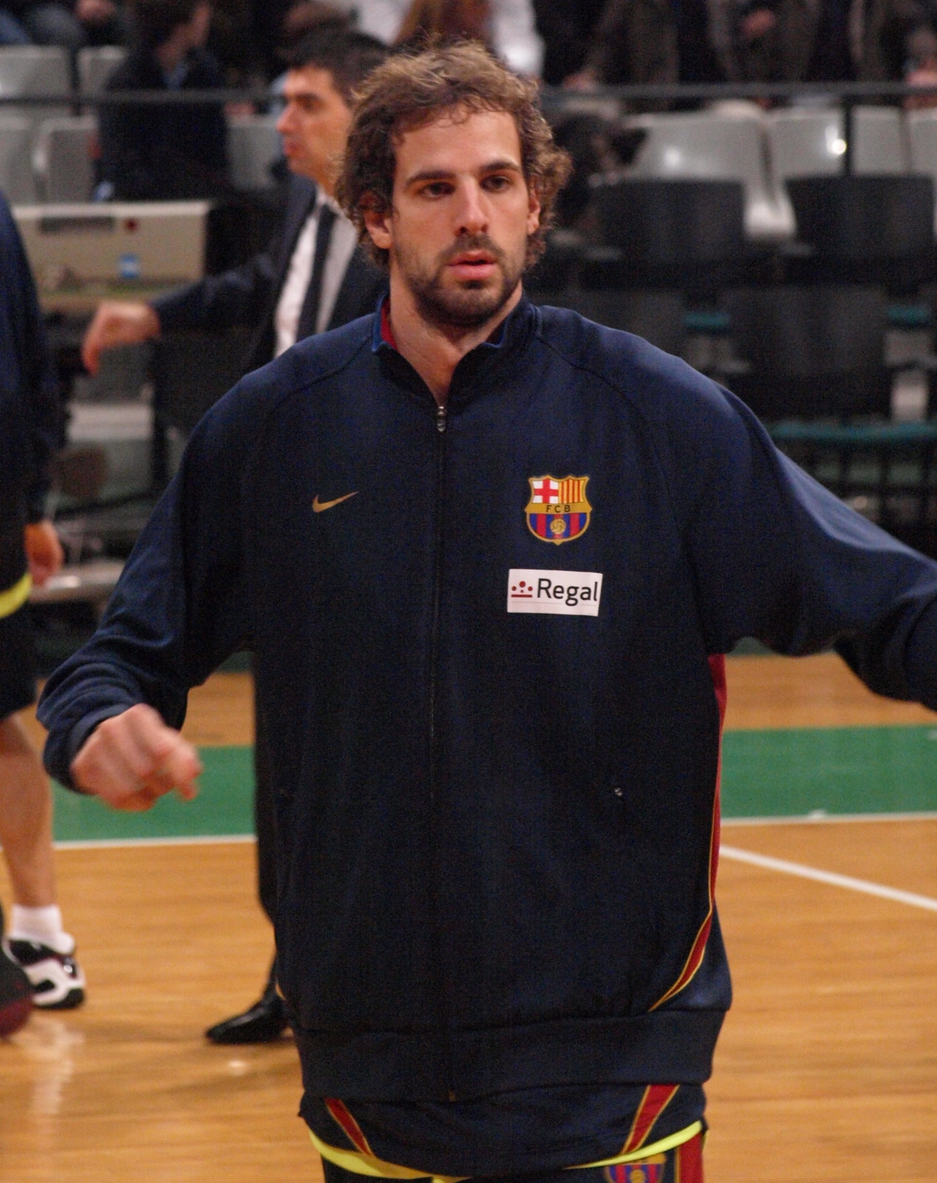 Roger Grimau, en el partido que enfrentó al FC Barcelona y al DKV Joventut de liga ACB en el Olímpico de Badalona en enero de 2009